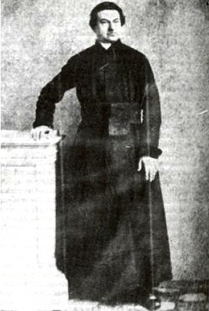 Josef Ondřej Liboslav Rettig